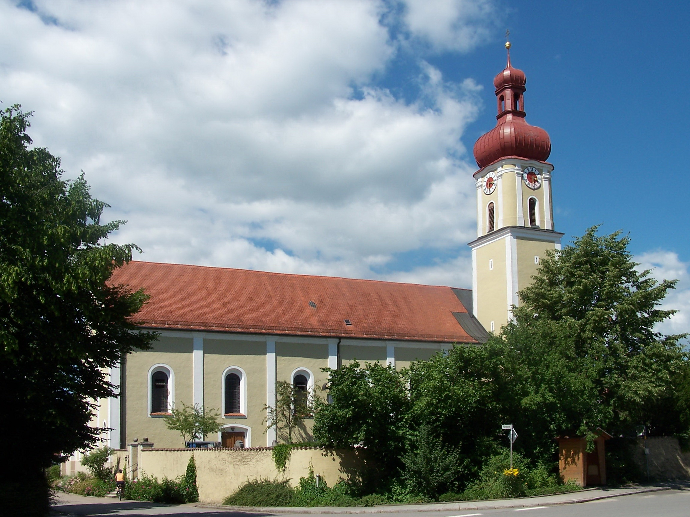 Riekoefen, Katholische Pfarrkirche St. Johann Bapt. und Johannes Ev., Saalbau mit eingezogenem Chor, Flankenturm mit Zwiebelhaube und Pilastergliederung, im Kern 14. Jahrhundert, Langhaus und Turmaufbau 18. Jahrhundert, 1897 erweitert, 1869 neugotischer Kapellenanbau, jetzt Sakristei; mit Ausstattung; Friedhofsmauer, 18./19. Jahrhundert.